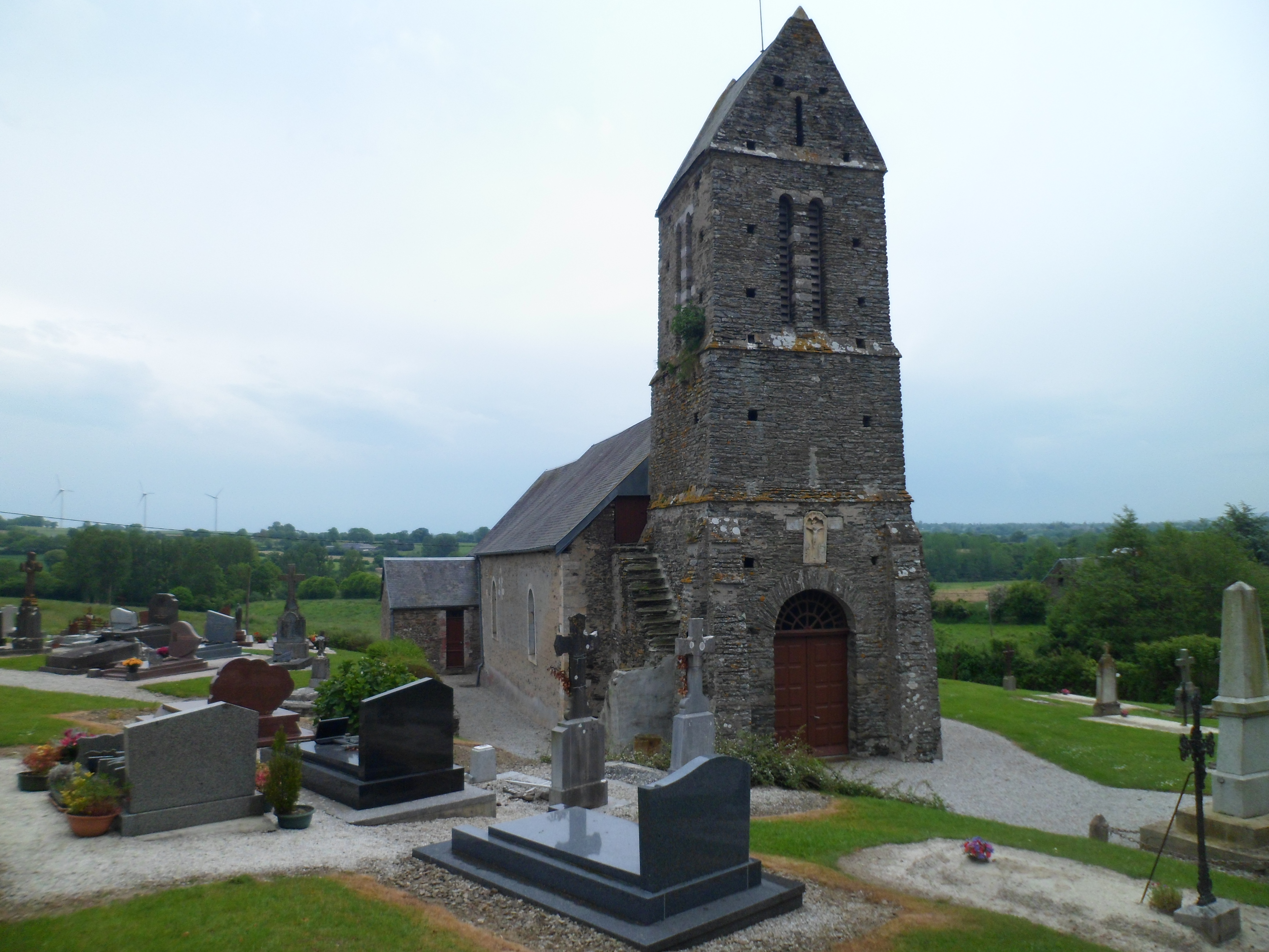 Église Saint-Martin de Montrabot